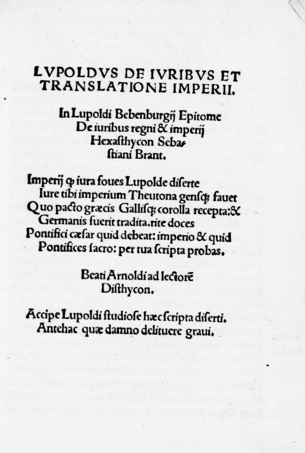 Frontespizio